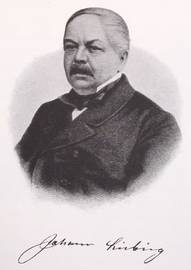 velkotovárník Johann Carl Iganz Liebieg